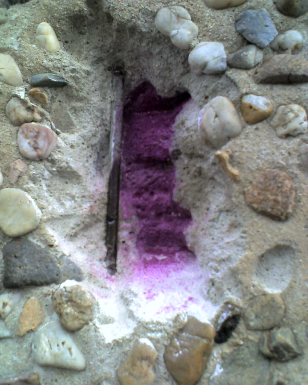 Nachweis von Carbonatisierung an Beton bis hinter die Bewehrung mit Phenolphtaleinlösung